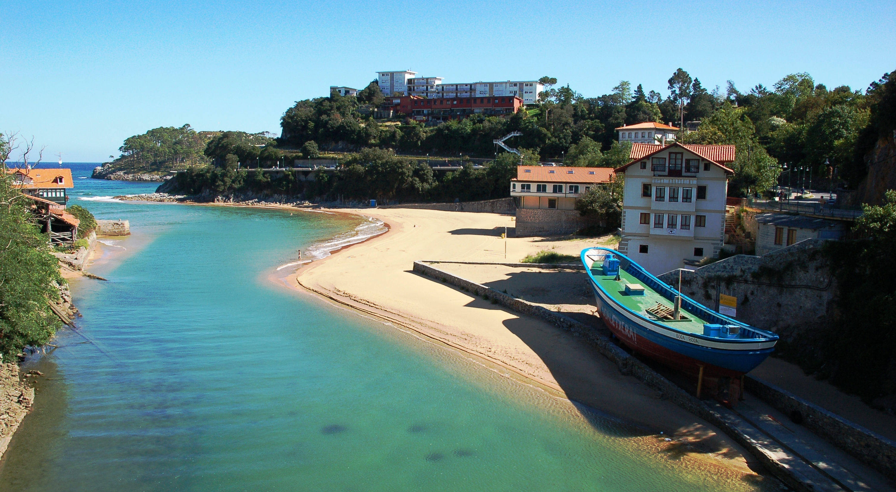 Llegando al mar